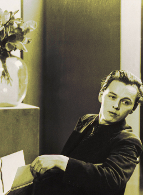 Victor Vasarely (Vásárhelyi Győző) (Pécs, 1906. április 9. – Párizs, 1997. március 15.) magyar festő, az op-art jelentős képviselője.